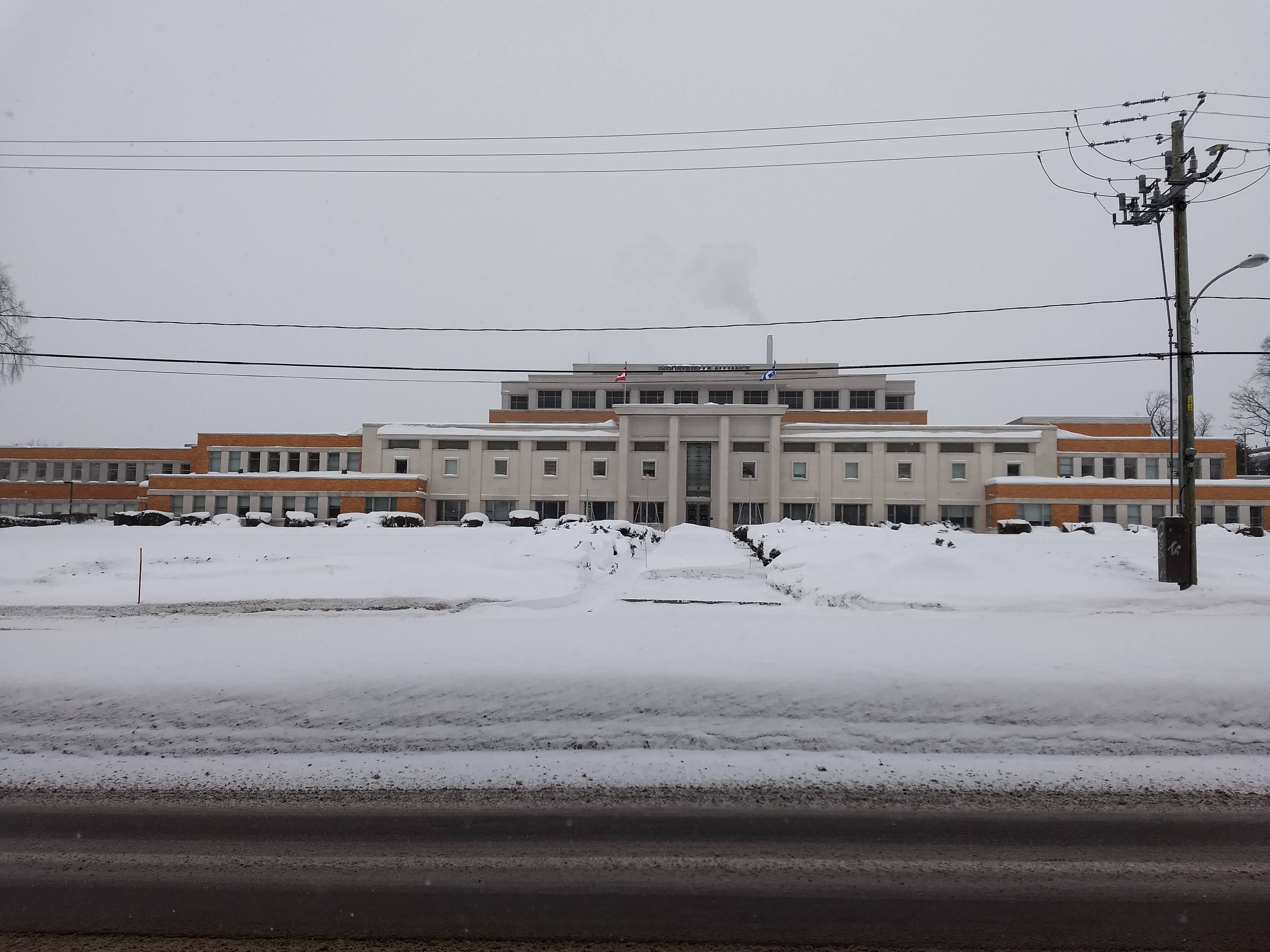 Siège du Groupe Financier IA (Industrielle Alliance), 1080 Grande Allée Ouest, Québec